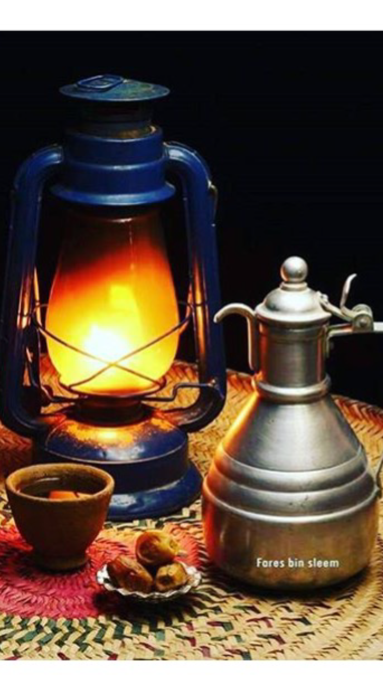 دلة حضرمية بجانب فنجان خاص بها وخلفهما مصباح